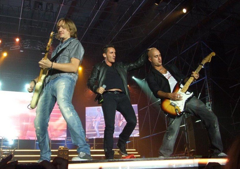 Opera propria